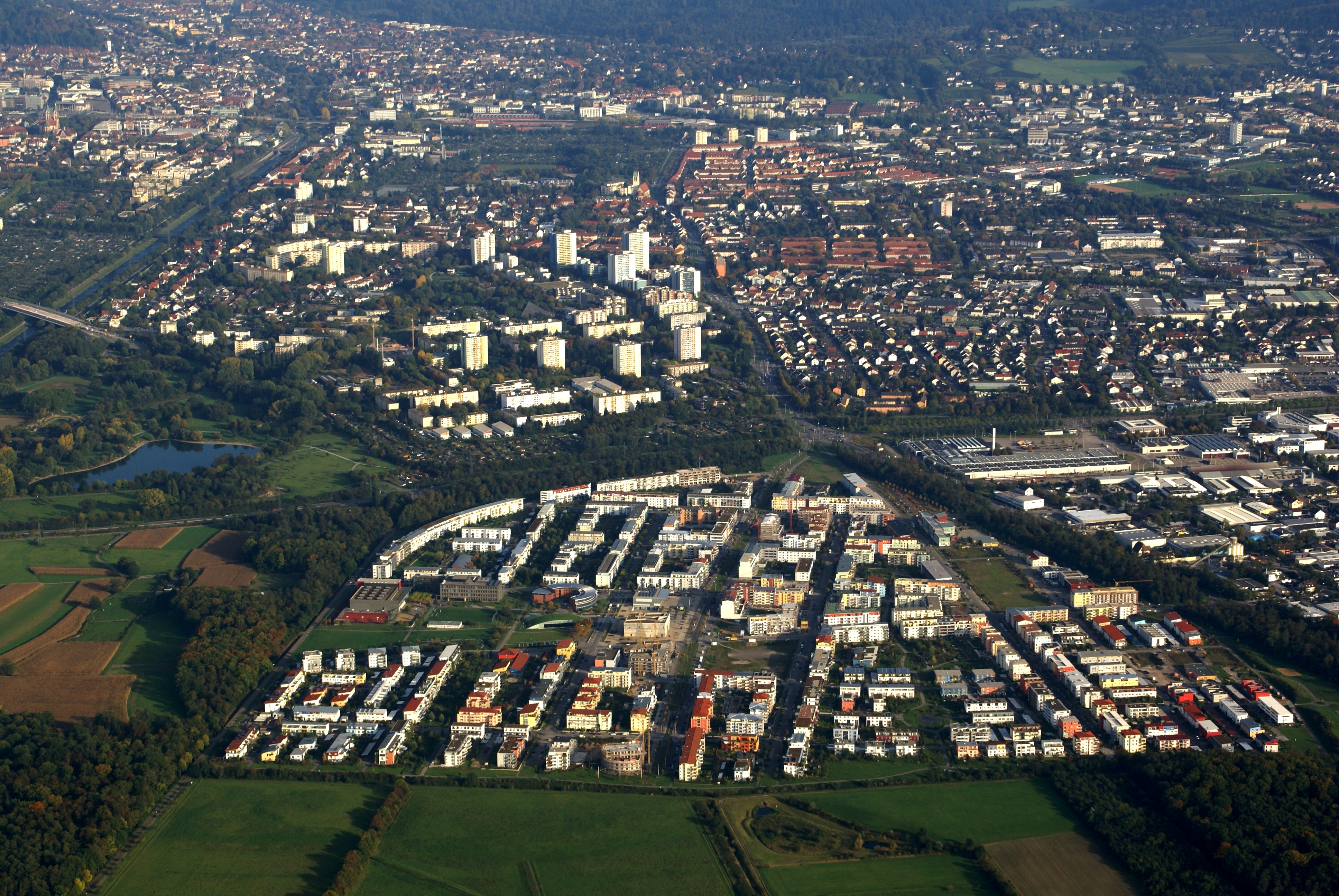 Luftbild von Freiburg im Breisgau mit dem neuen Stadtteil Rieselfeld